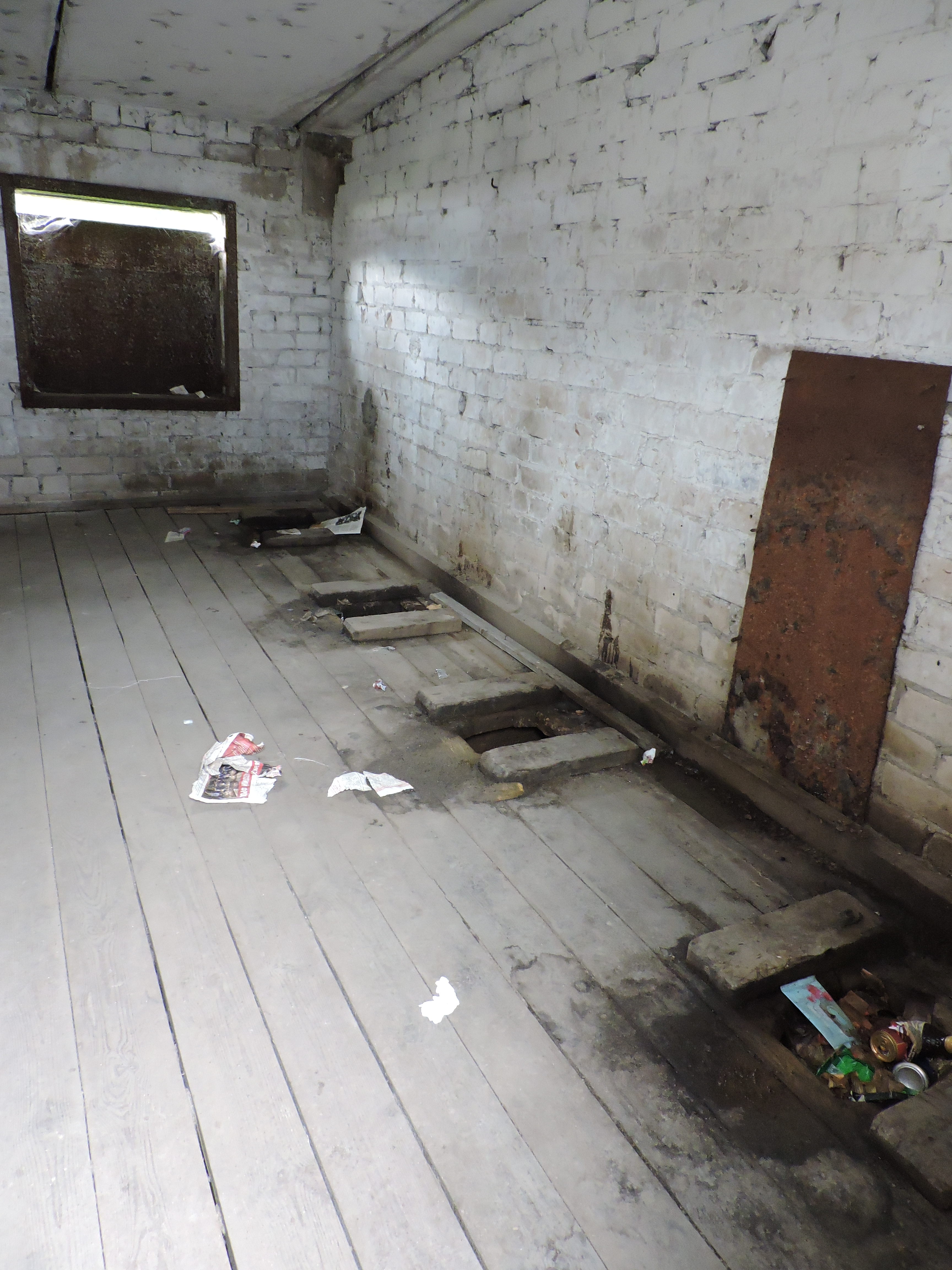 Классическая ямная уборная